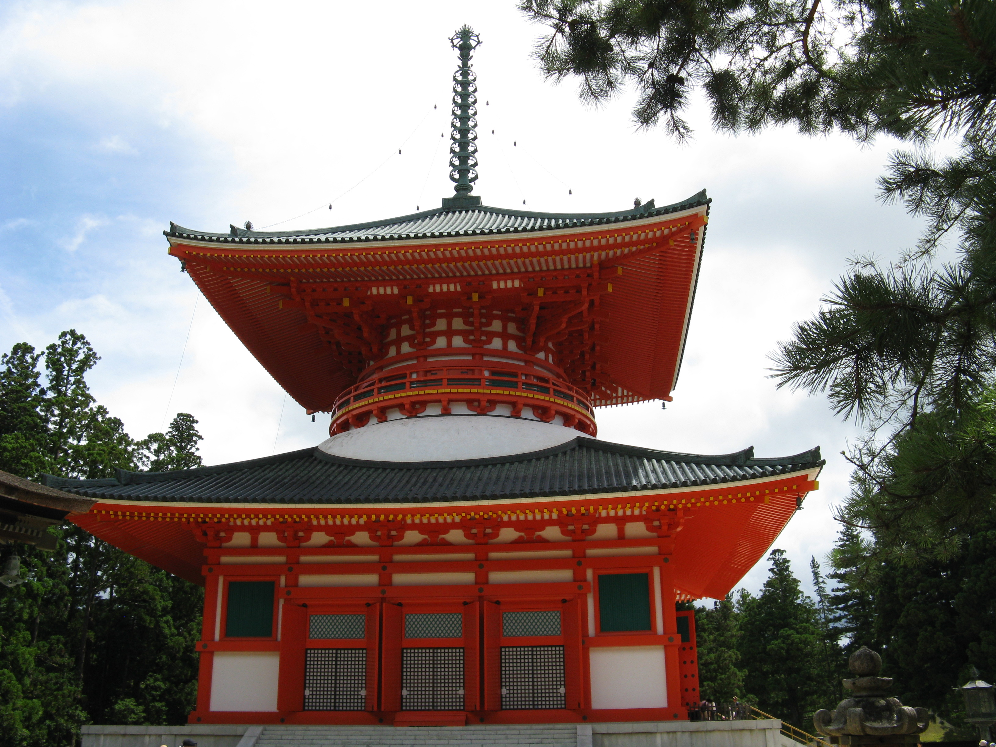 高野山 壇場伽藍 根本大塔